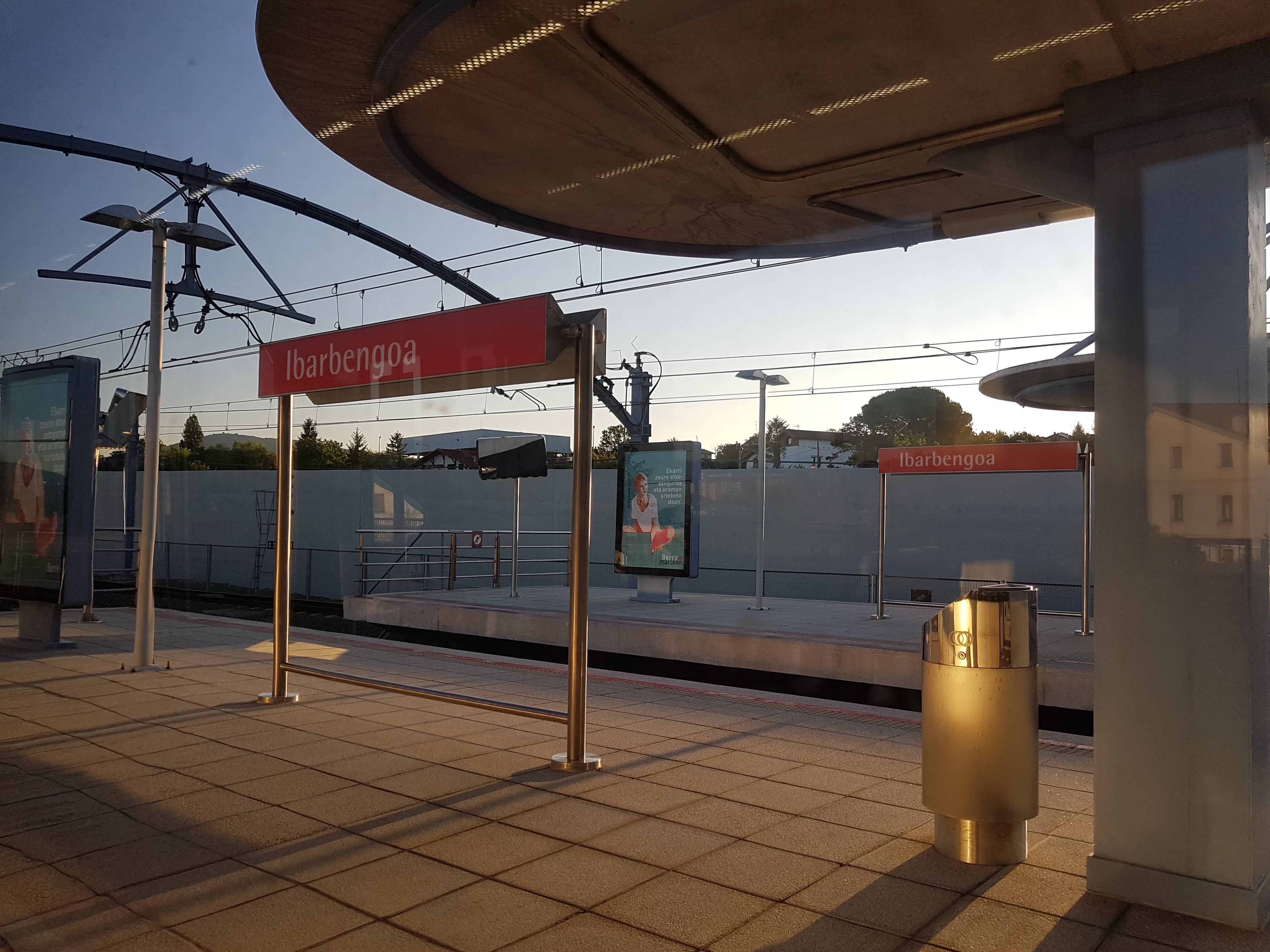 Estación de Ibarbengoa.